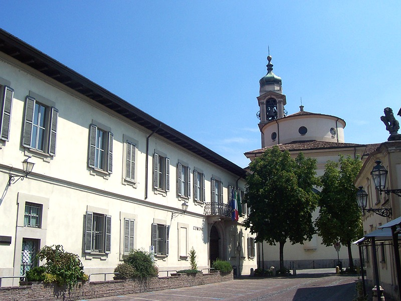 Inzago - Municipio